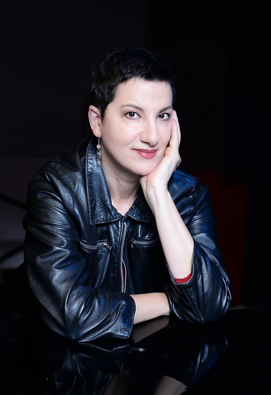 Lloll Bertran